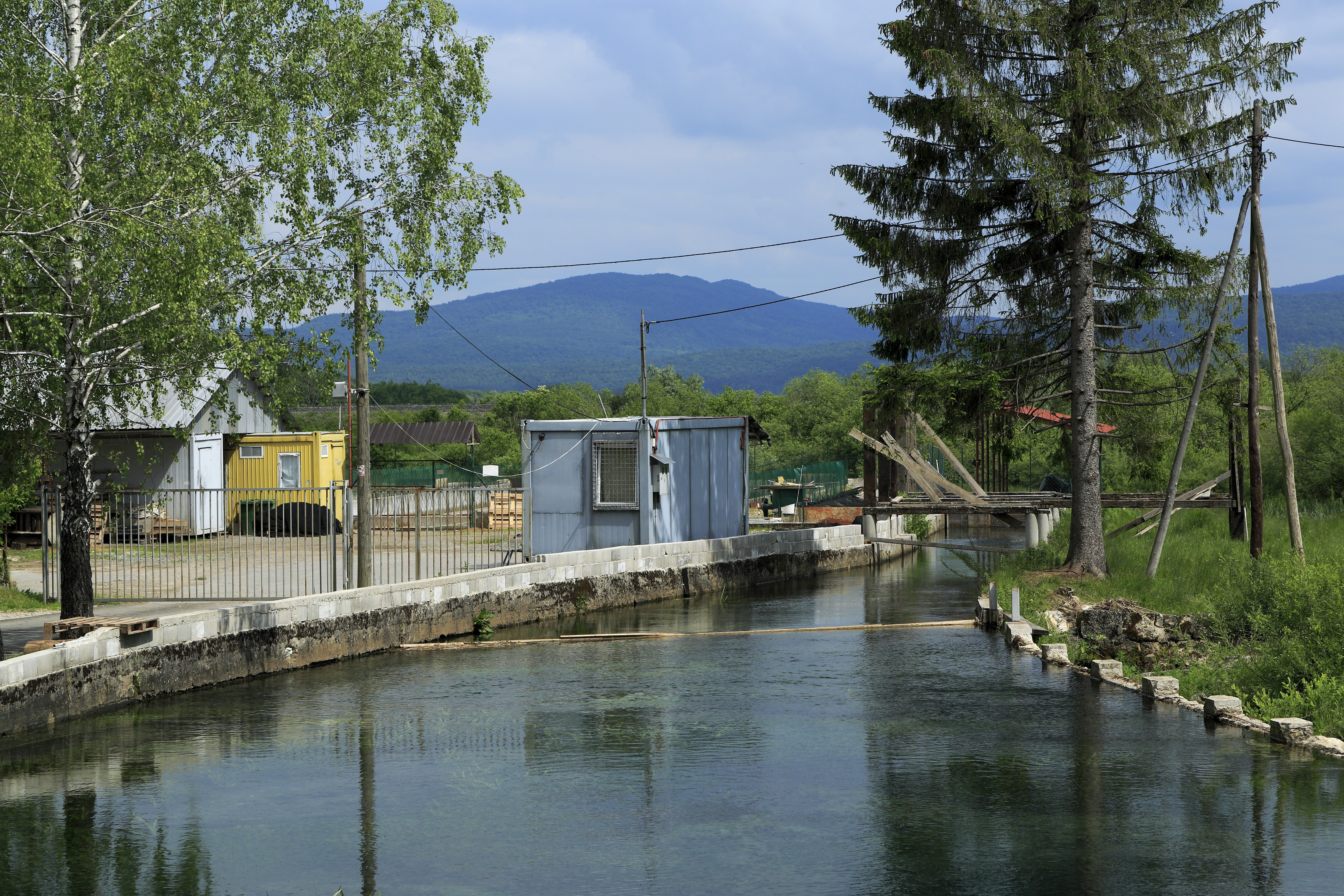 Von der Brücke der D42 Richtung Osten stromabwärts. Im Hintergrund links hinter dem Metallzaun liegt die Fischzuchtanstalt mit fünf nebeneinanderliegenden Becken, für deren Wasserversorgung die Dretulja aufgestaut wurde. Nach rechts läuft das überschüssige Wasser über den Überlauf in die untere Haltung ab.